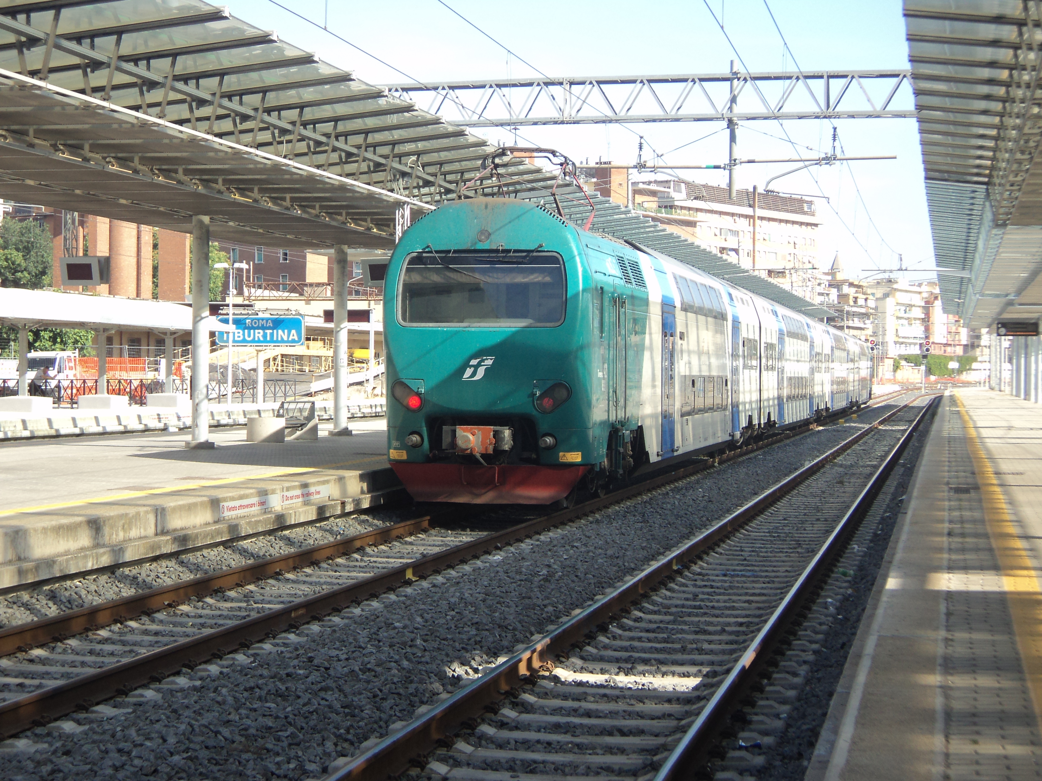 Elettrotreno TAF